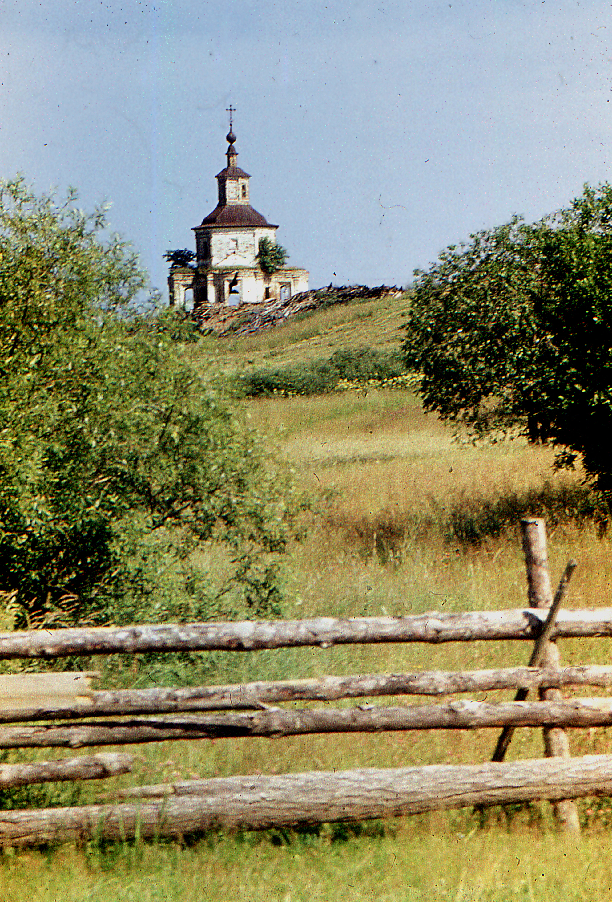 Церковь Рождества Иоанна Предтечи в селе Пухово (Великоустюгский район)